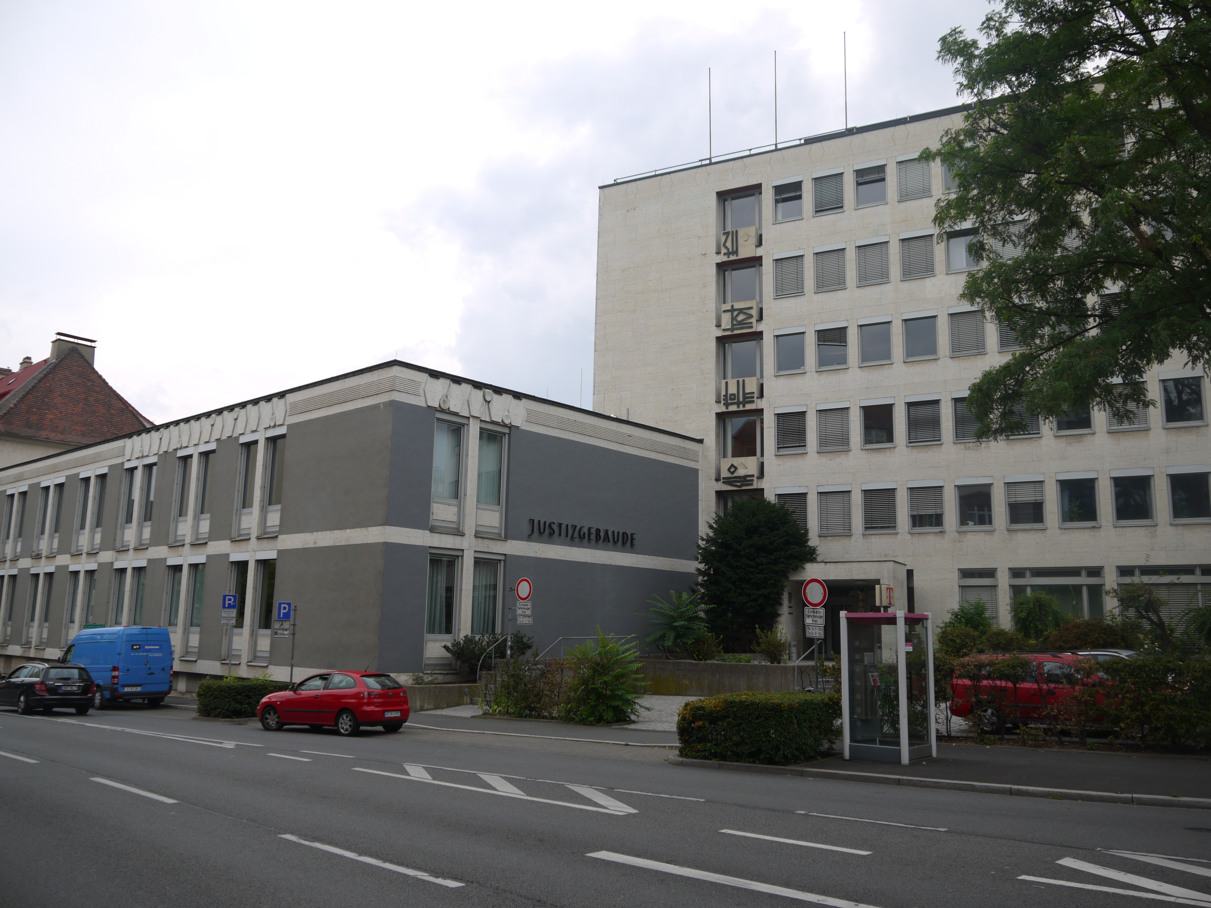 Erthalstraße 3, Justizgebäude in Aschaffenburg (denkmalgeschützt